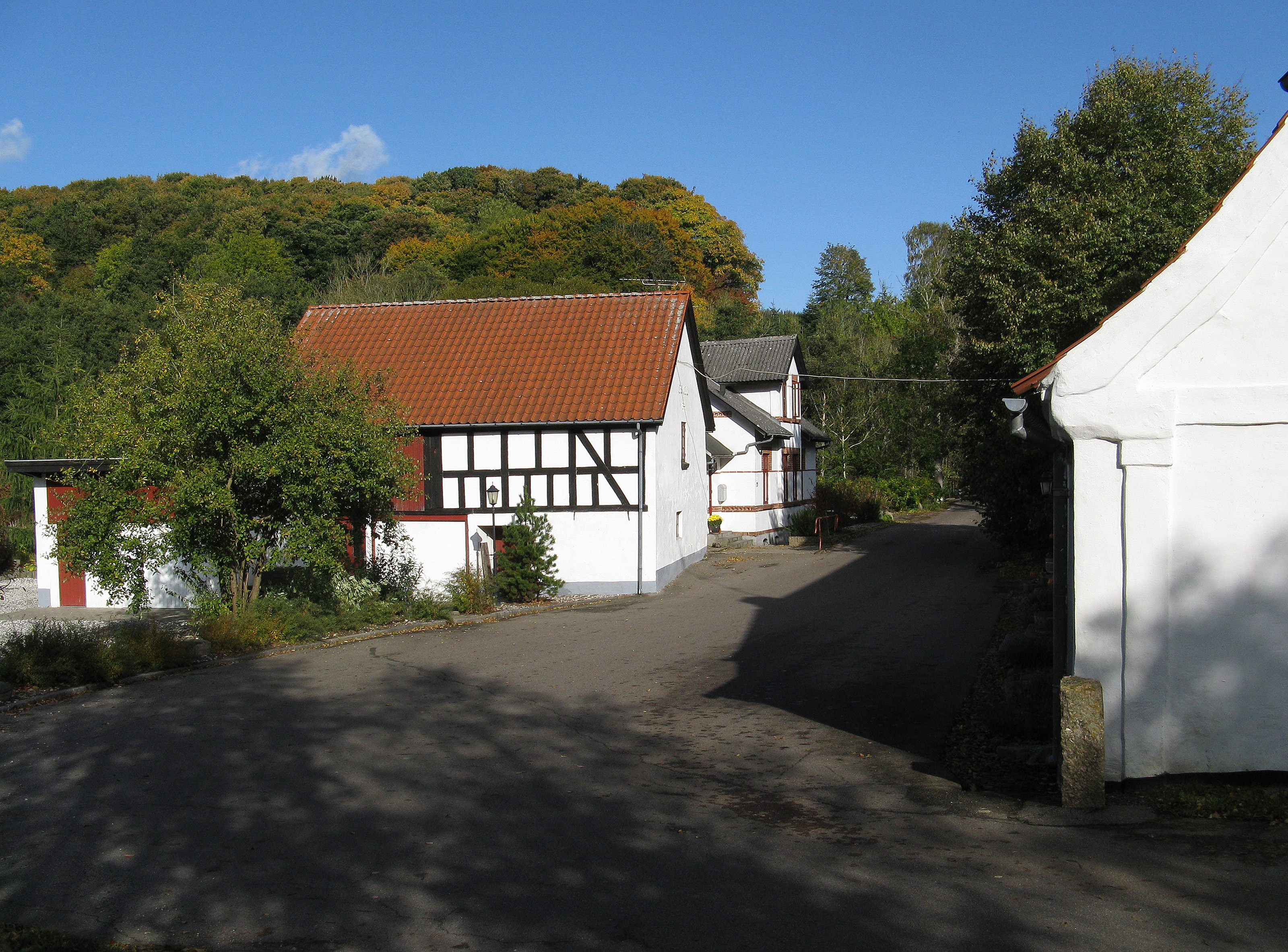 Bodil Mølle ved Århus Å